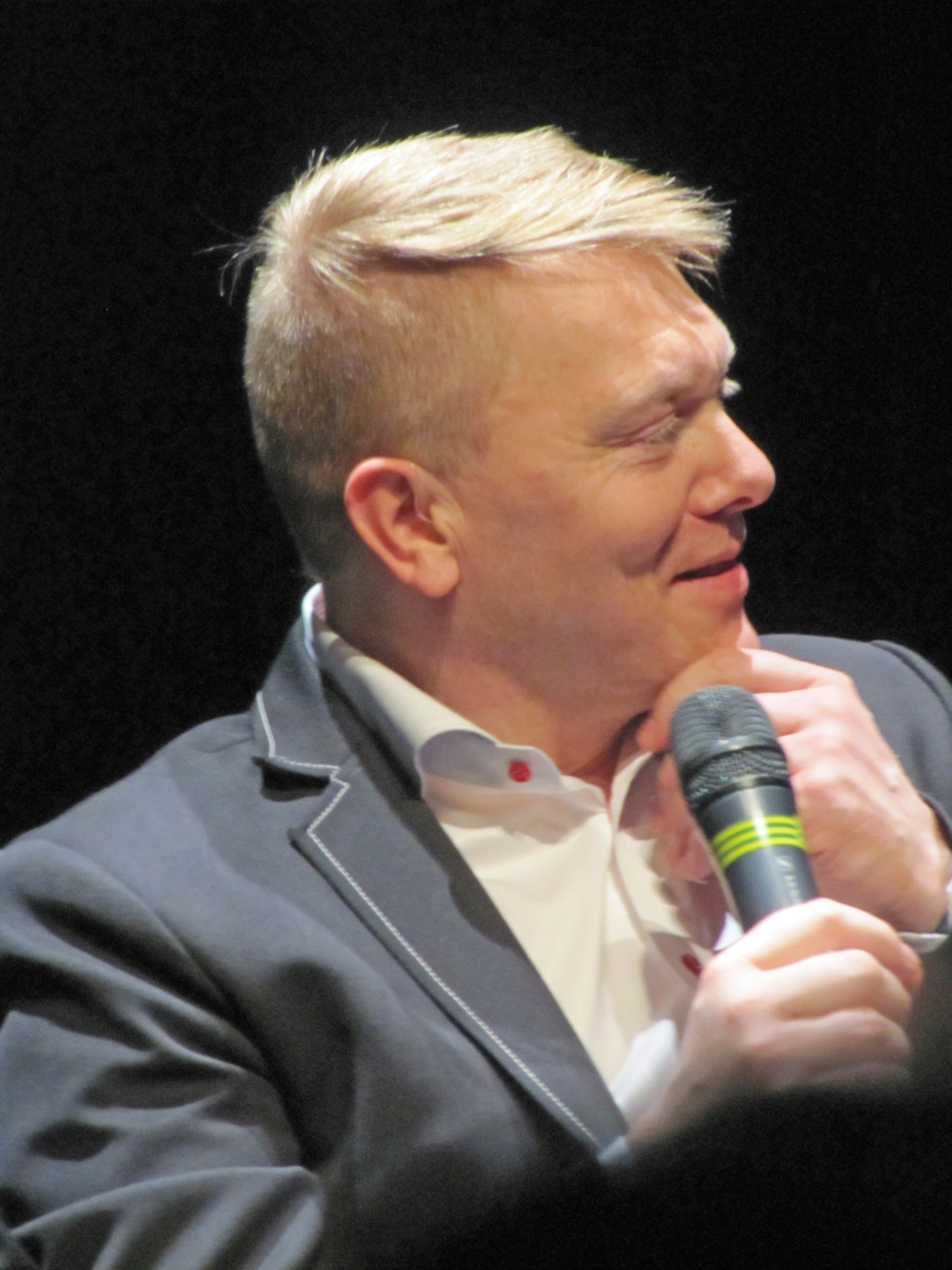 Jón Gnarr, 2011 in Frankfurt am Main.